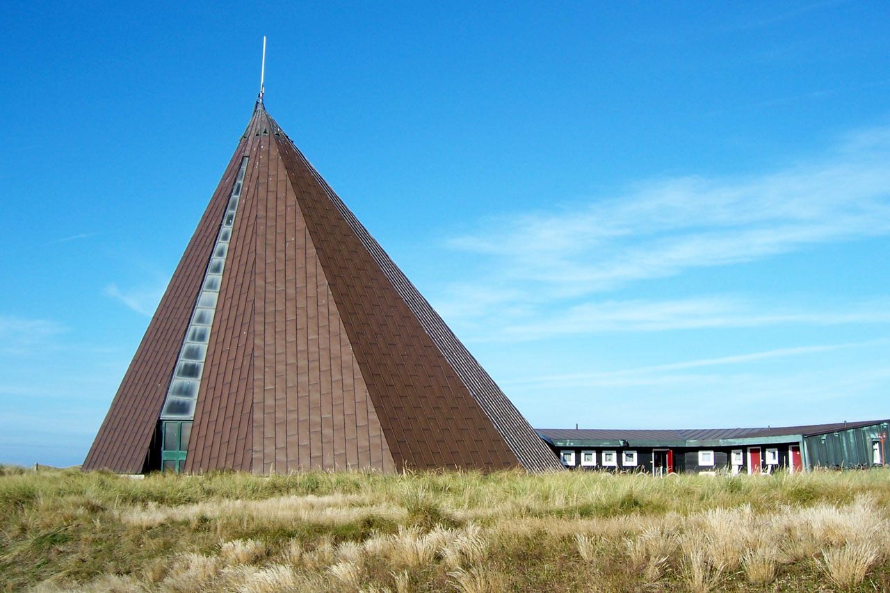 Nordseeinsel Spiekeroog. Katholische Kirche